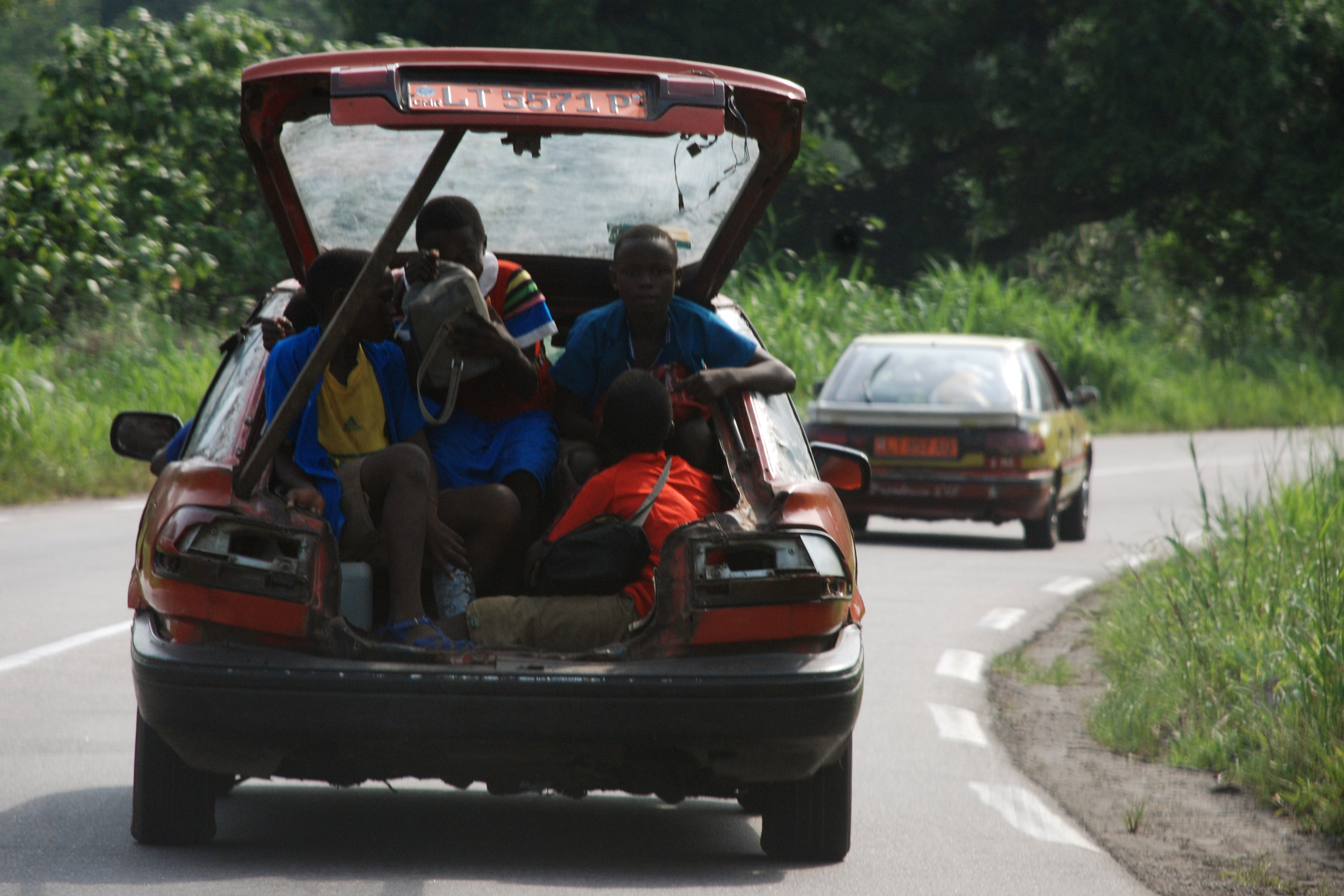 Transport des passagers à Mbanga au Cameroun. This is an image with the theme "Africa on the Move or Transport" from: Cameroon